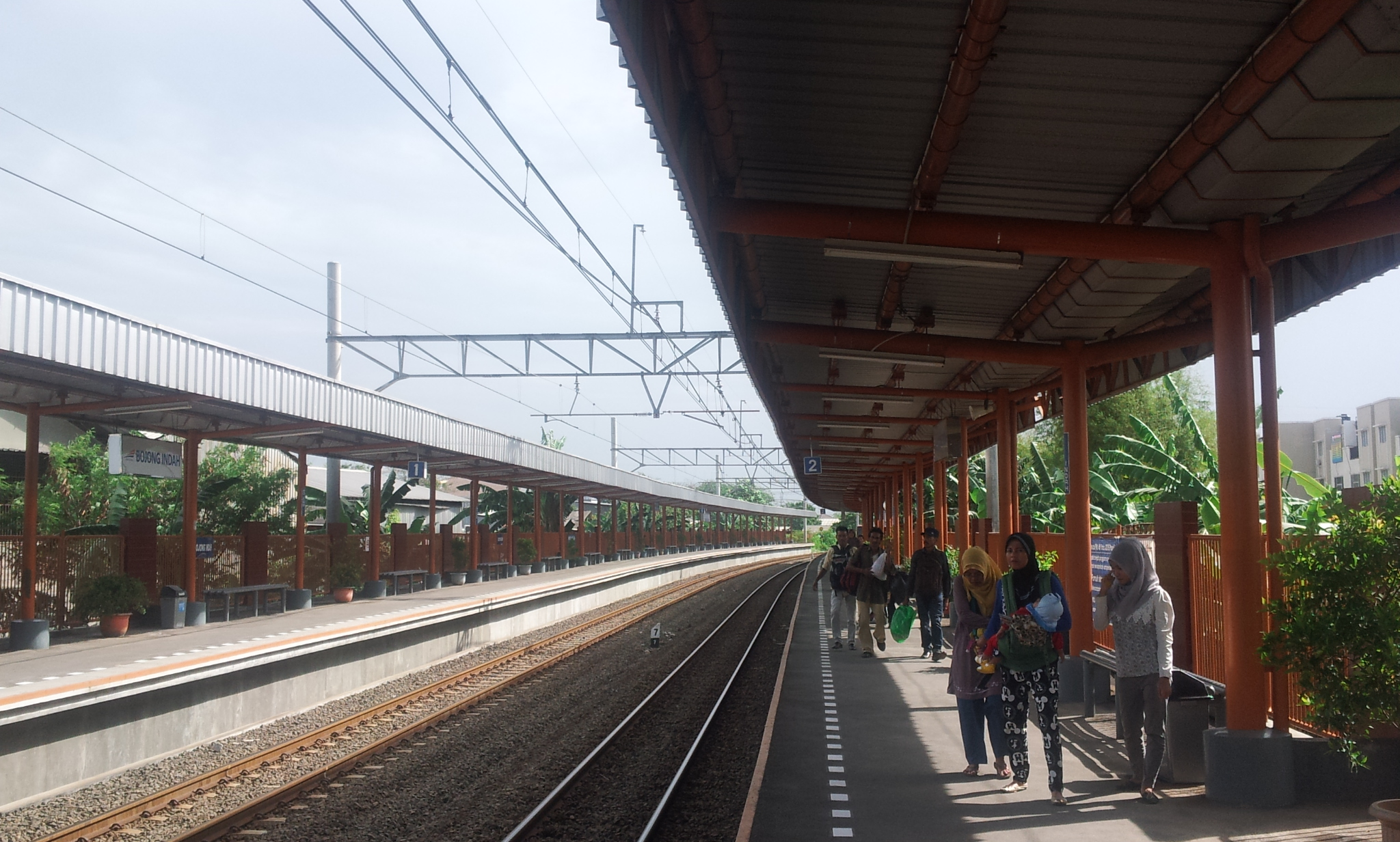 Stasiun Bojong Indah